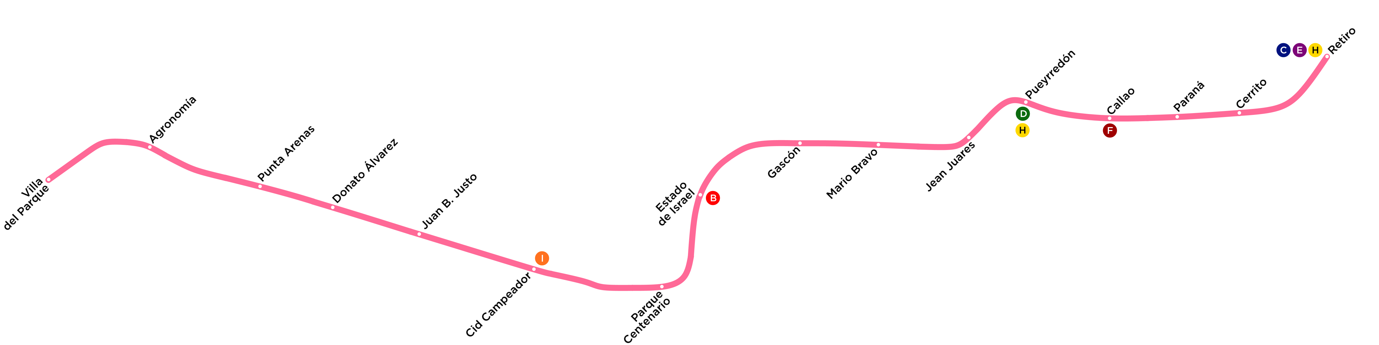 Recorrido de la línea G entre Retiro y Villa del Parque.